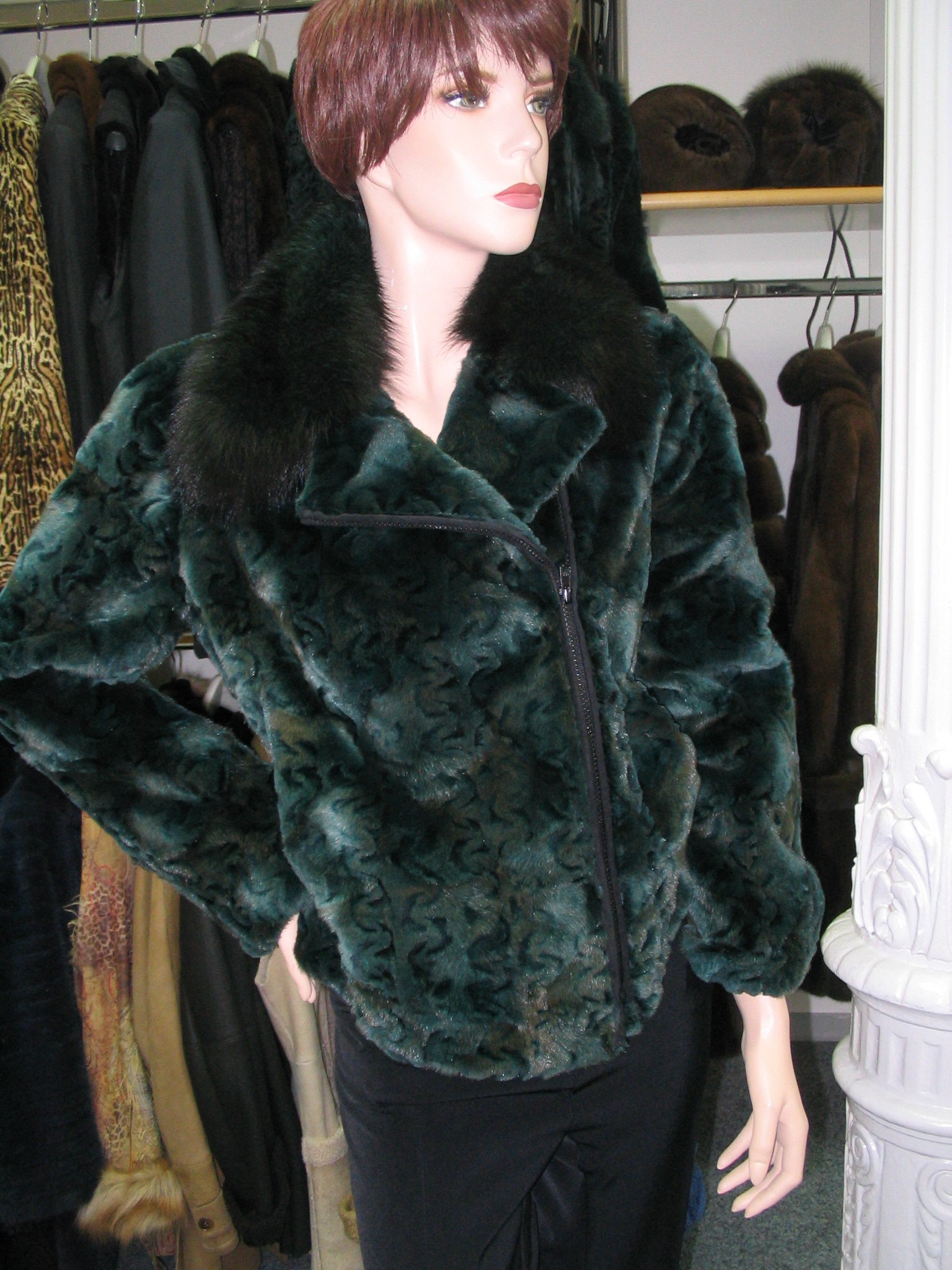 Jacke aus Nerzthiliki mit Fuchskragen, gefärbt, geschoren, gelasertes Reliefmuster. Gesehen bei Herhold Pelze, Wiesbaden.